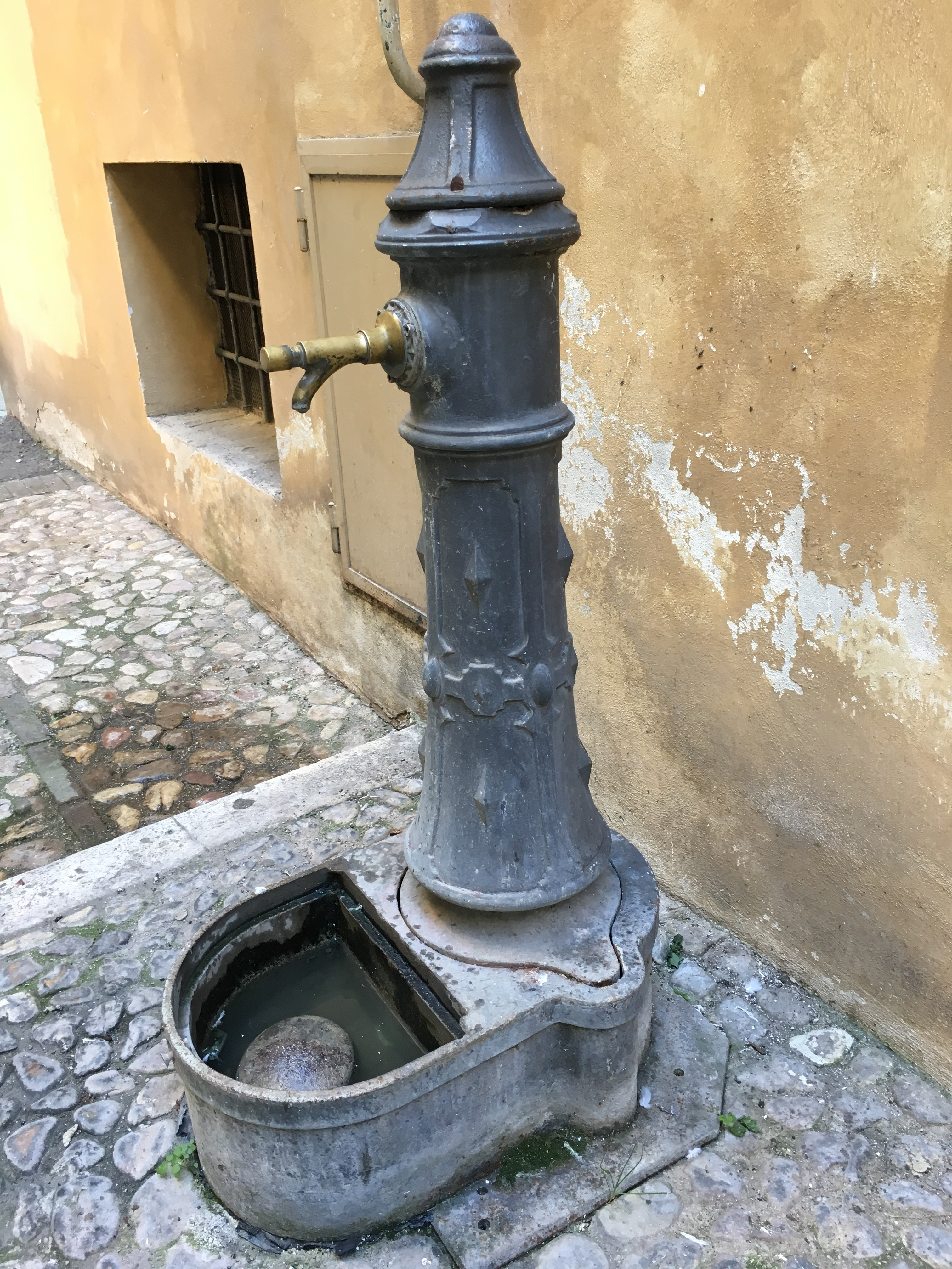 Fontana Spoleto In vicolo Poli